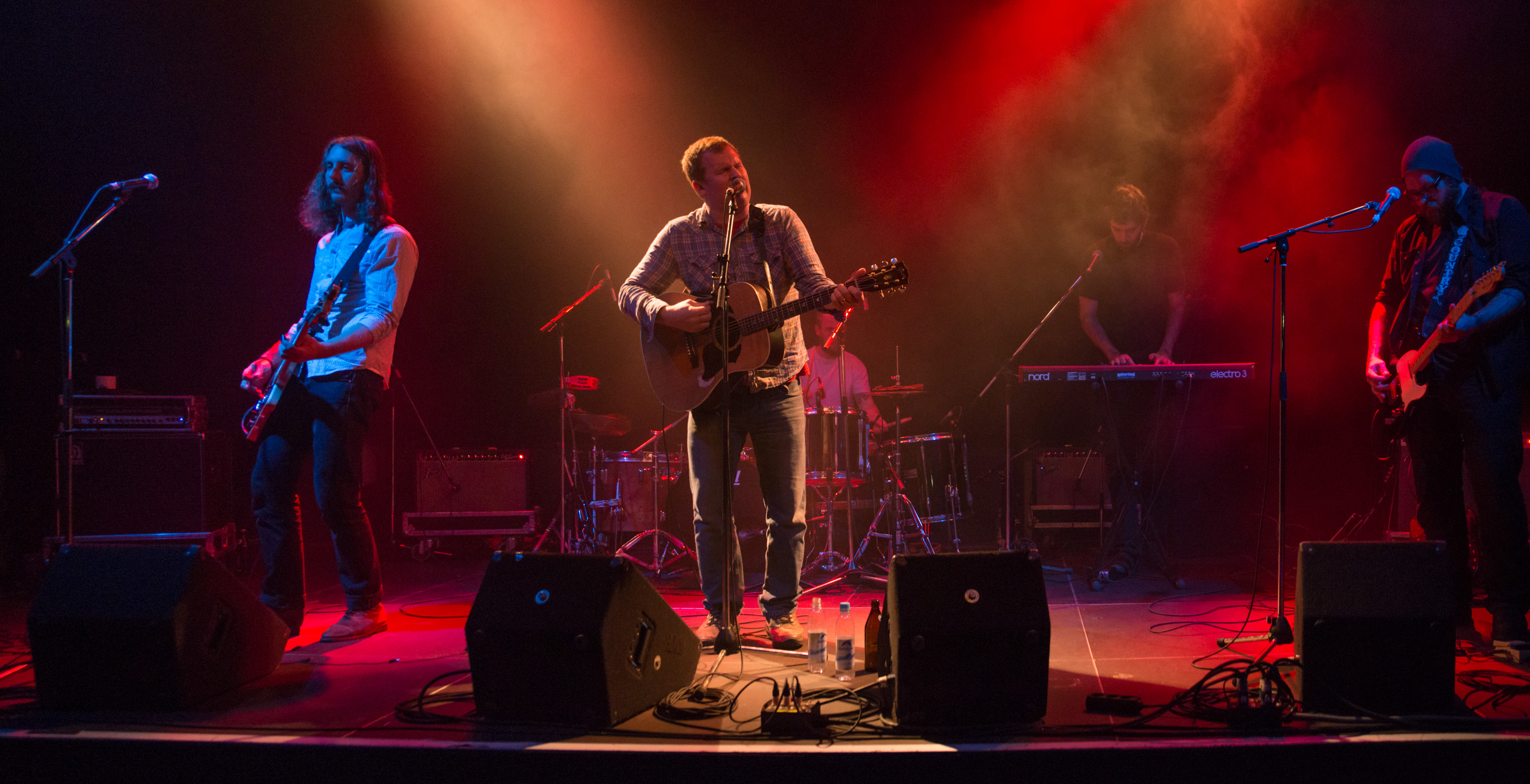 de The Builders and Butchers 2014 Muenchen Kranhalle